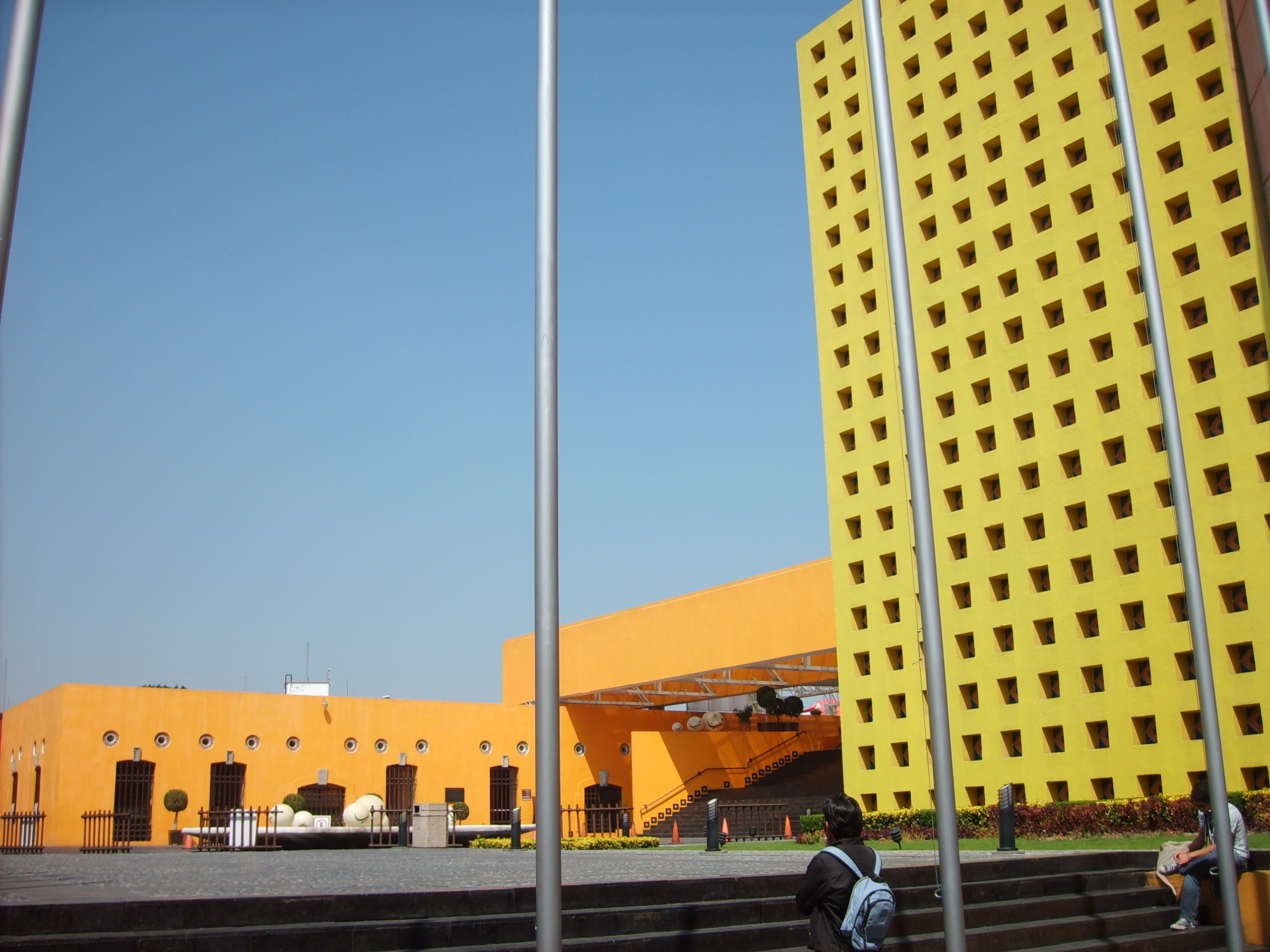 Centro de Convenciones de Puebla, en el desarrollo comercial Paseo de San Francisco